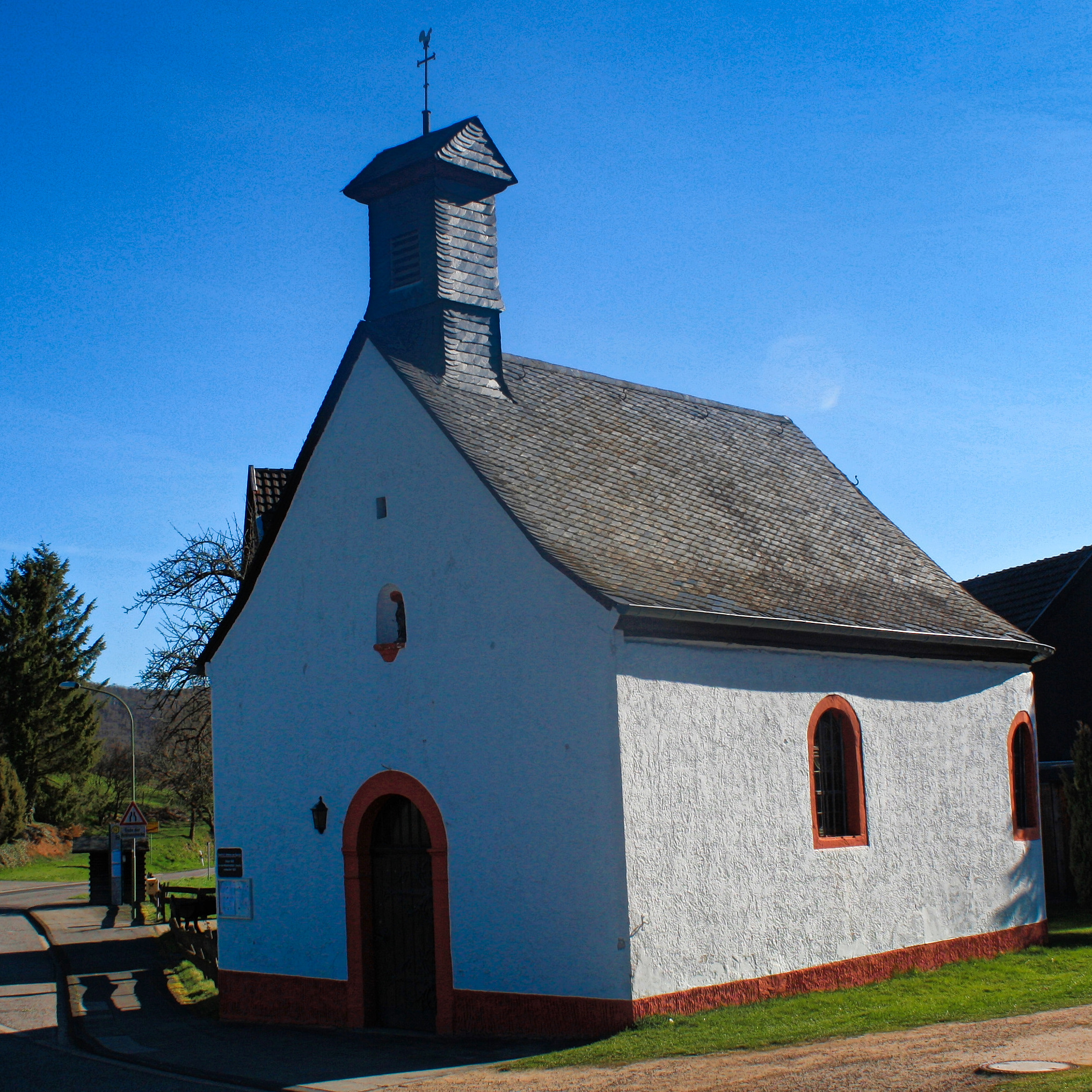 Kapelle Kolvenbach